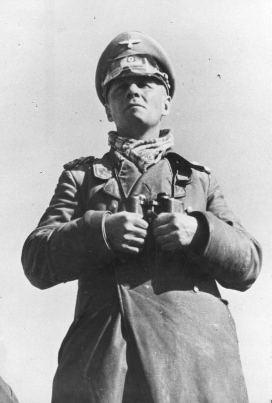 Generalfeldmarschall Rommel während einer der [?] zwischen Tobruk und Sidi Omar. herausgb. 22.6.42 (PBZ) Pk-Aufnahme Kriegsberichter Zwilling (PBZ)